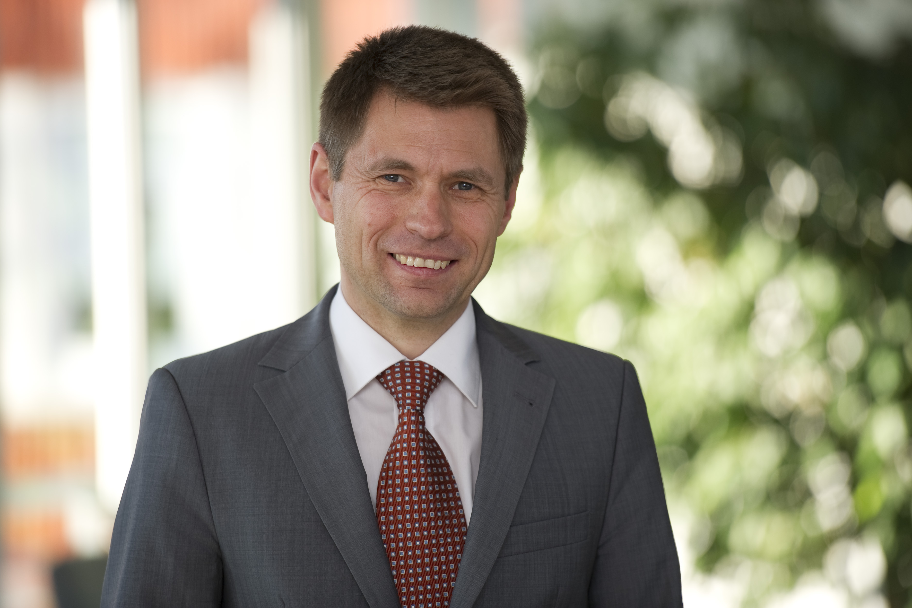 Mathias Mogge